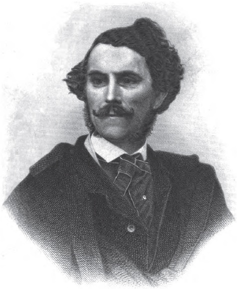 Otto von Corvin (Otto Julius Bernhard von Corvin-Wiersbitzki) 1812-1886, Quelle: Aus dem Leben eines Volkskämpfers, Amsterdam 1861